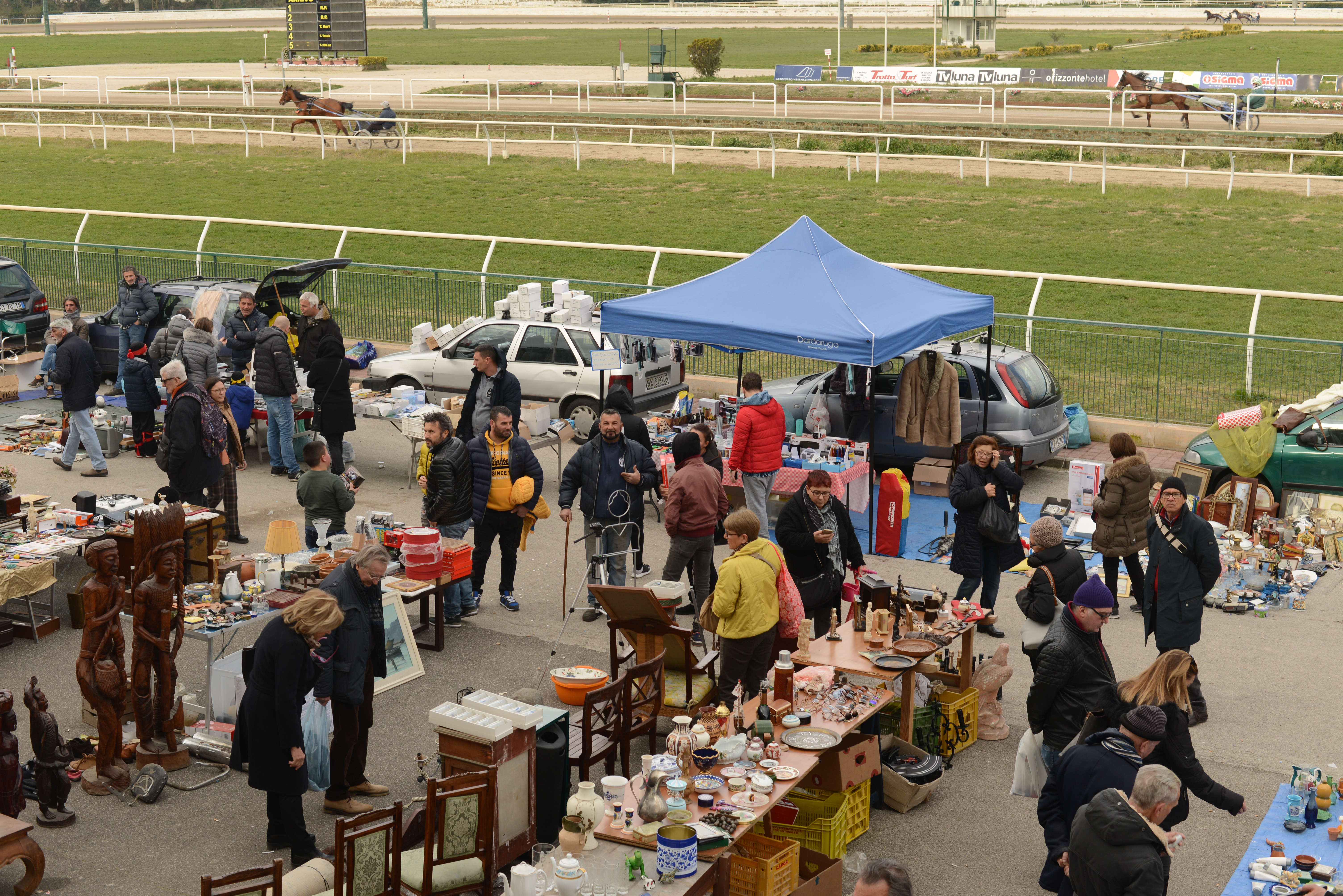 Mercato delle pulci di Agnano in una domenica di febbraio 2018.